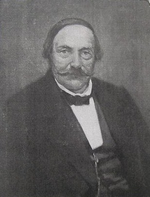 Jakob Sitka (??? - 1863), Český právník a politik.